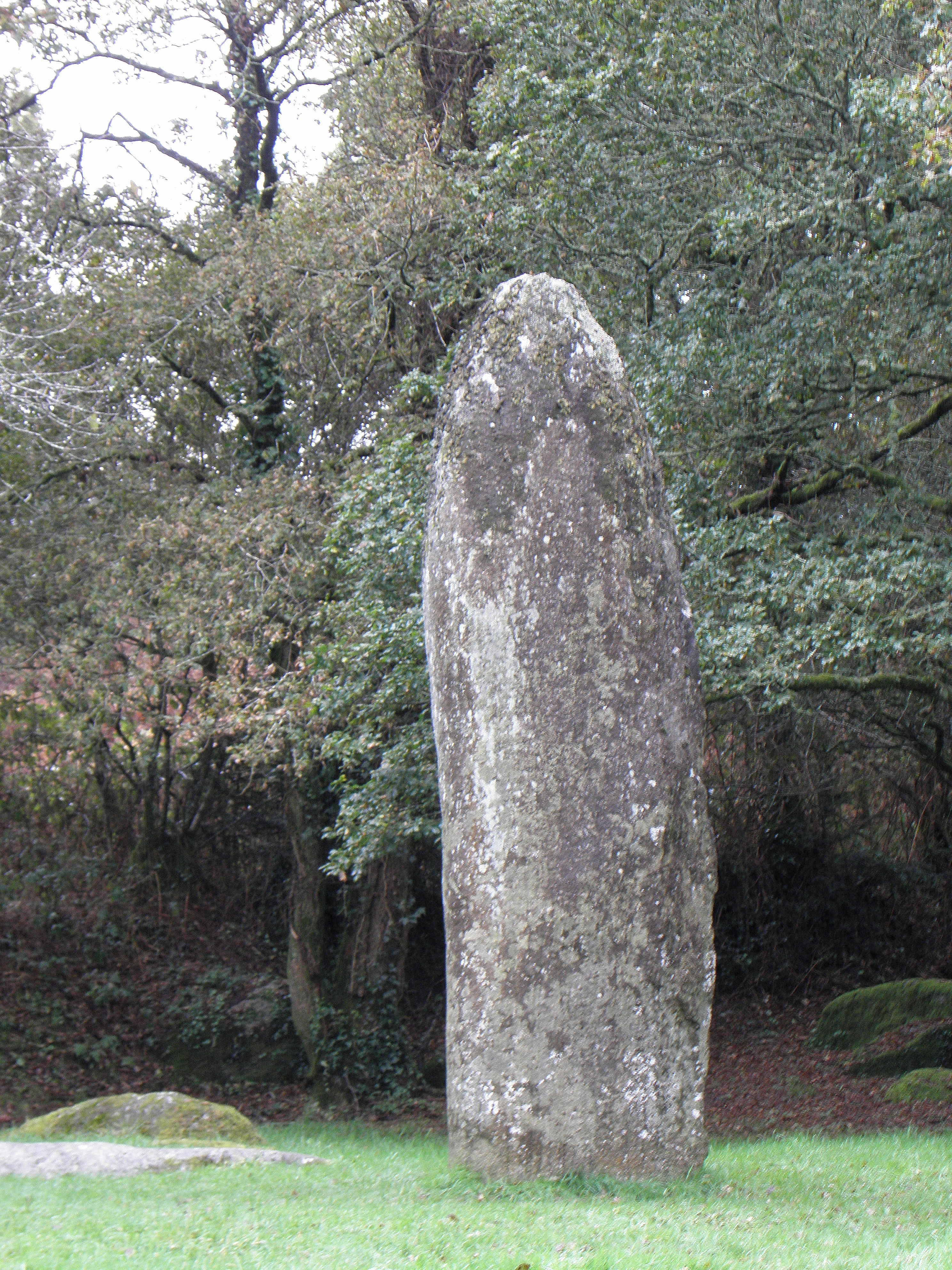 Menhir de Kerampeulven en Berrien (29). .